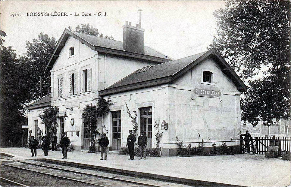 La gare de Boissy-Saint-Léger, Val-de-Marne, France.